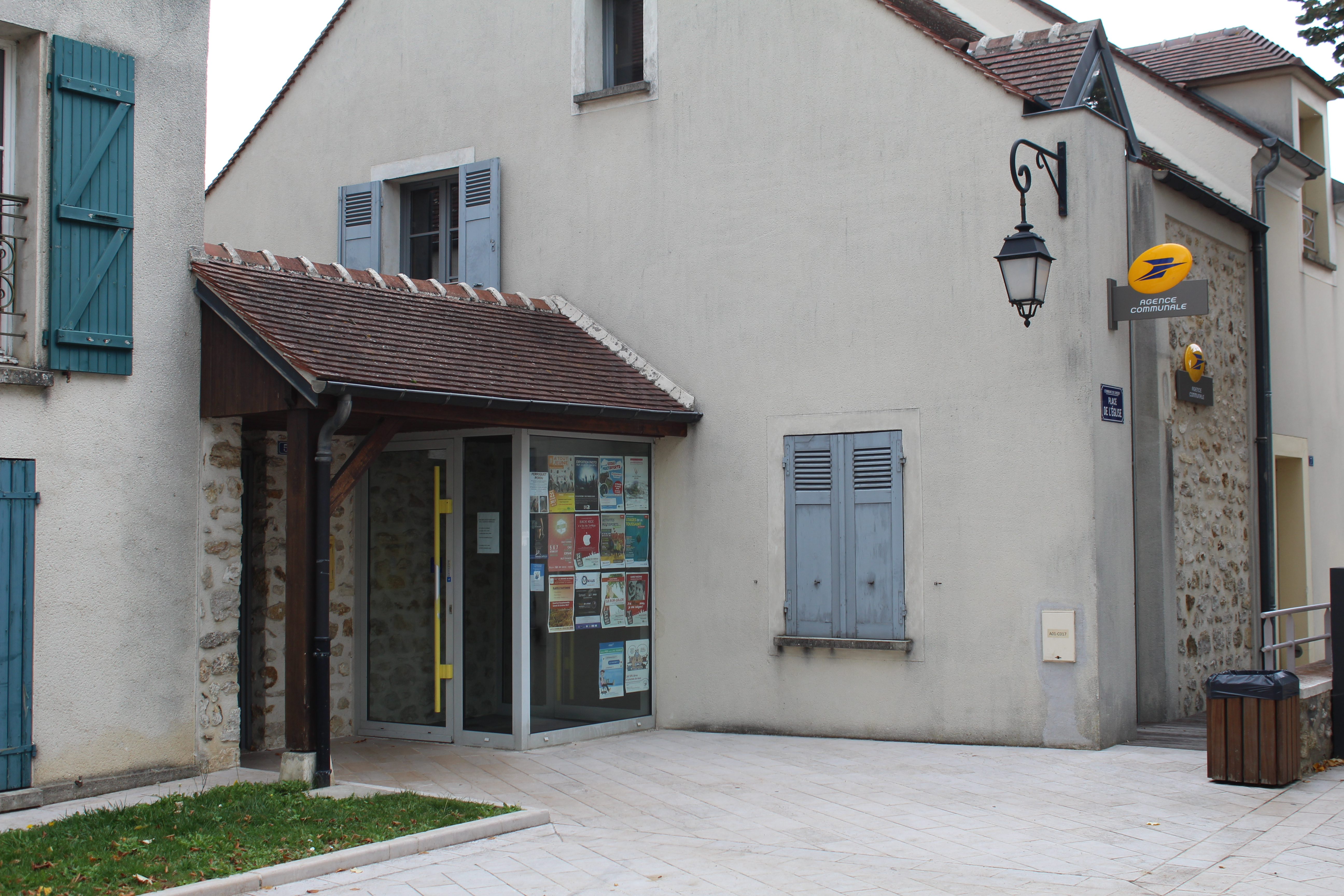 Agence postale de Chessy, Seine-et-Marne.